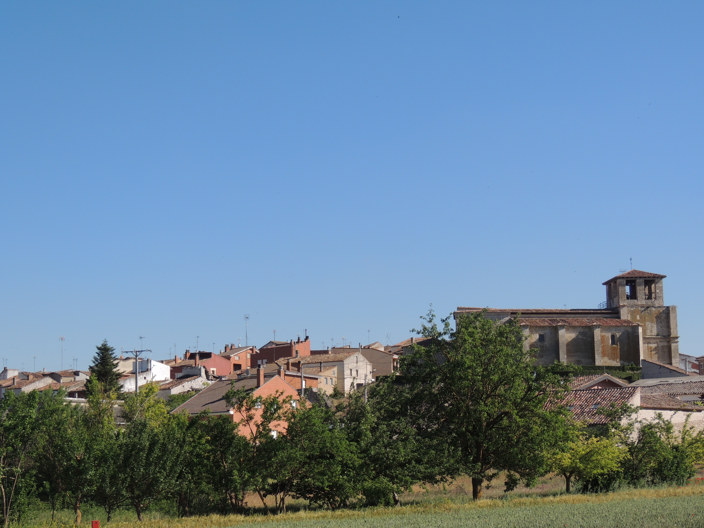 Villafruela (Burgos) vista desde el Puente Abajo